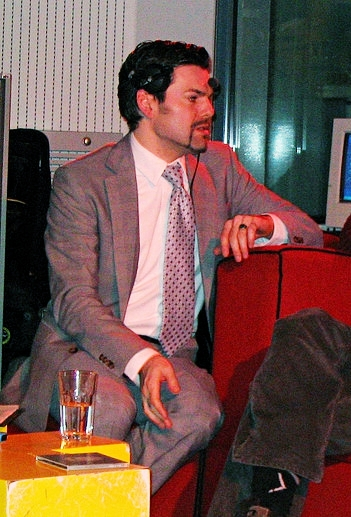 Ken Jebsen interviewt jemanden bei Radio Fritz, 2005 (cropped)